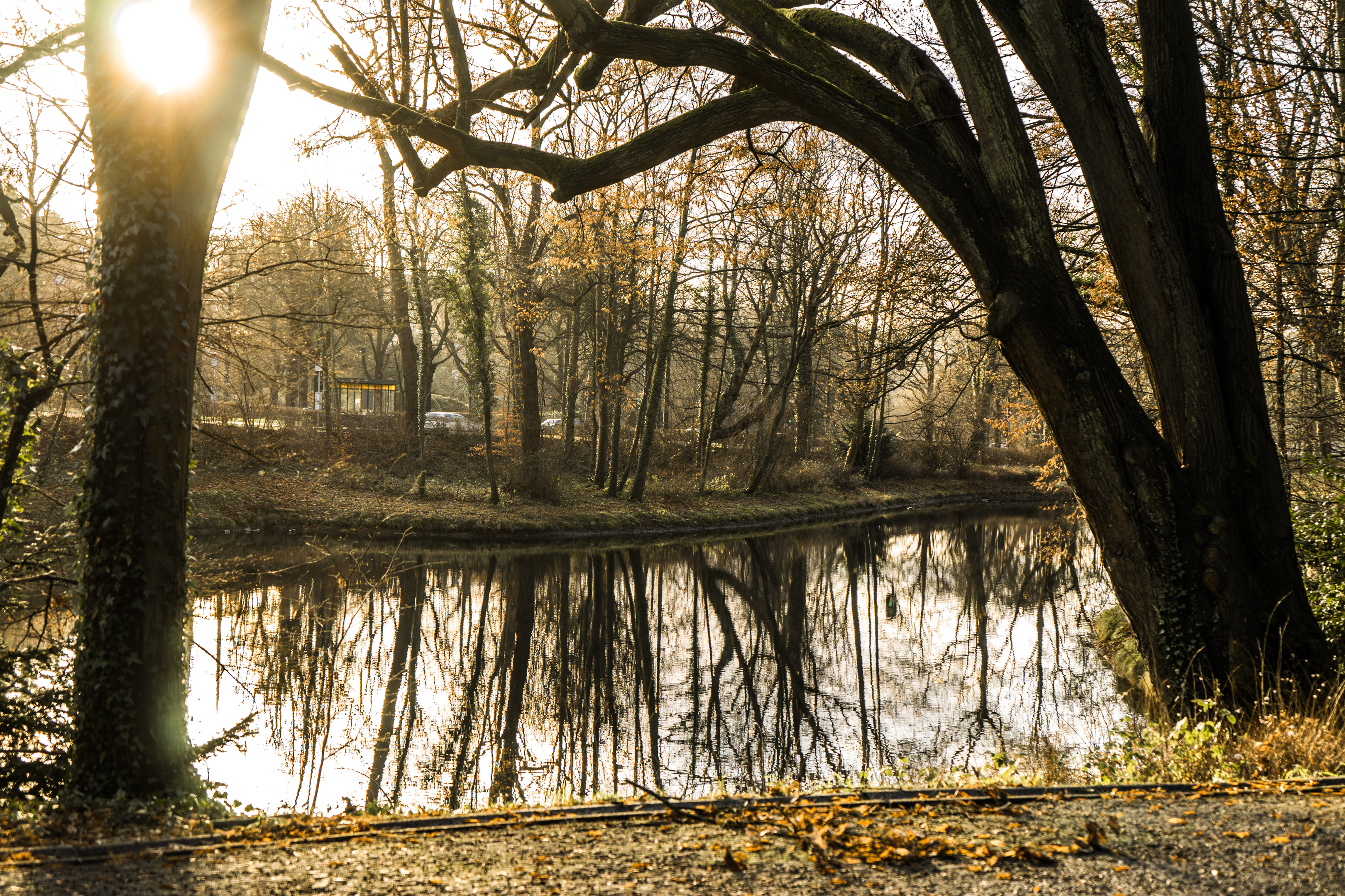 Etang du Parc Parmentier